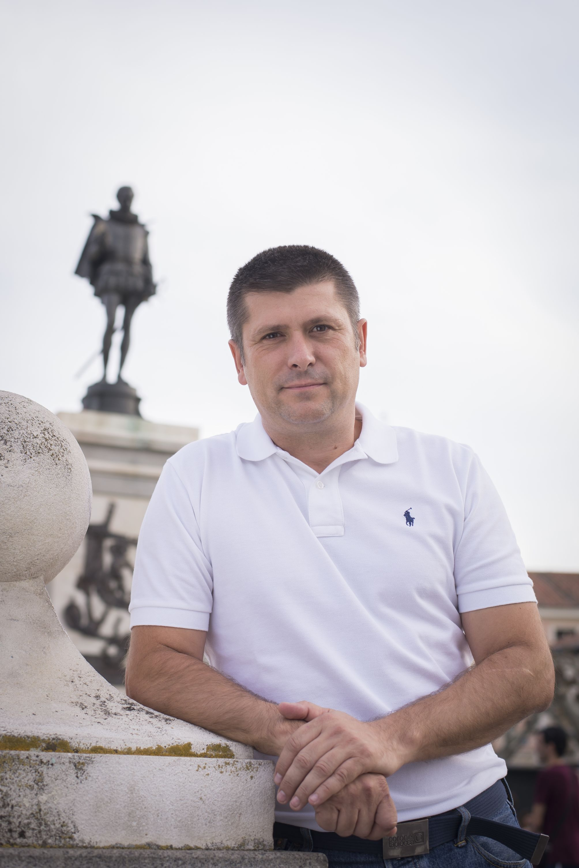 Fotografía licencia libre de Rafael Ripoll. Fotografía sacada en la Plaza de Cervantes de Alcalá de Henares y que se hecho exprofeso para su cesión a Comons, Wikipedia y cualquier uso de manera libre y gratuita